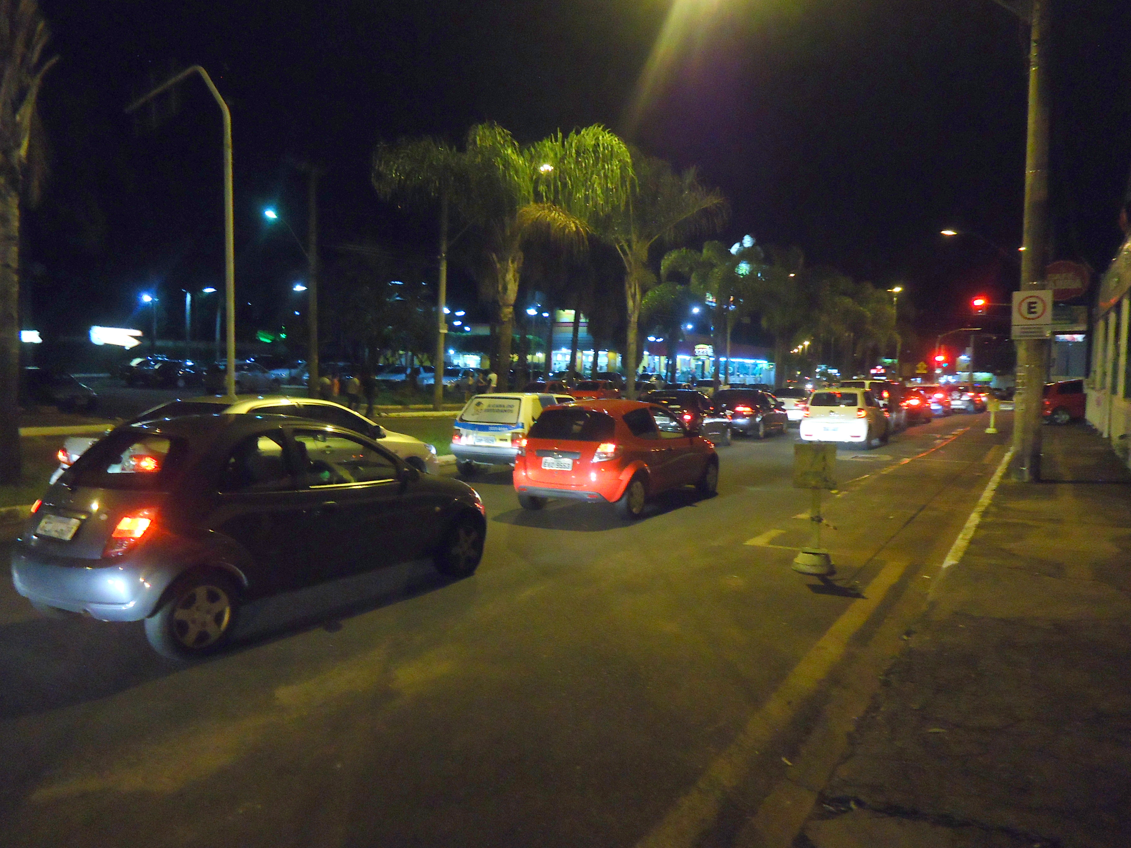 Av. Anselmo Alves dos Santos, na zona sul de Uberlândia, próxima a Av. Rondon Pacheco.